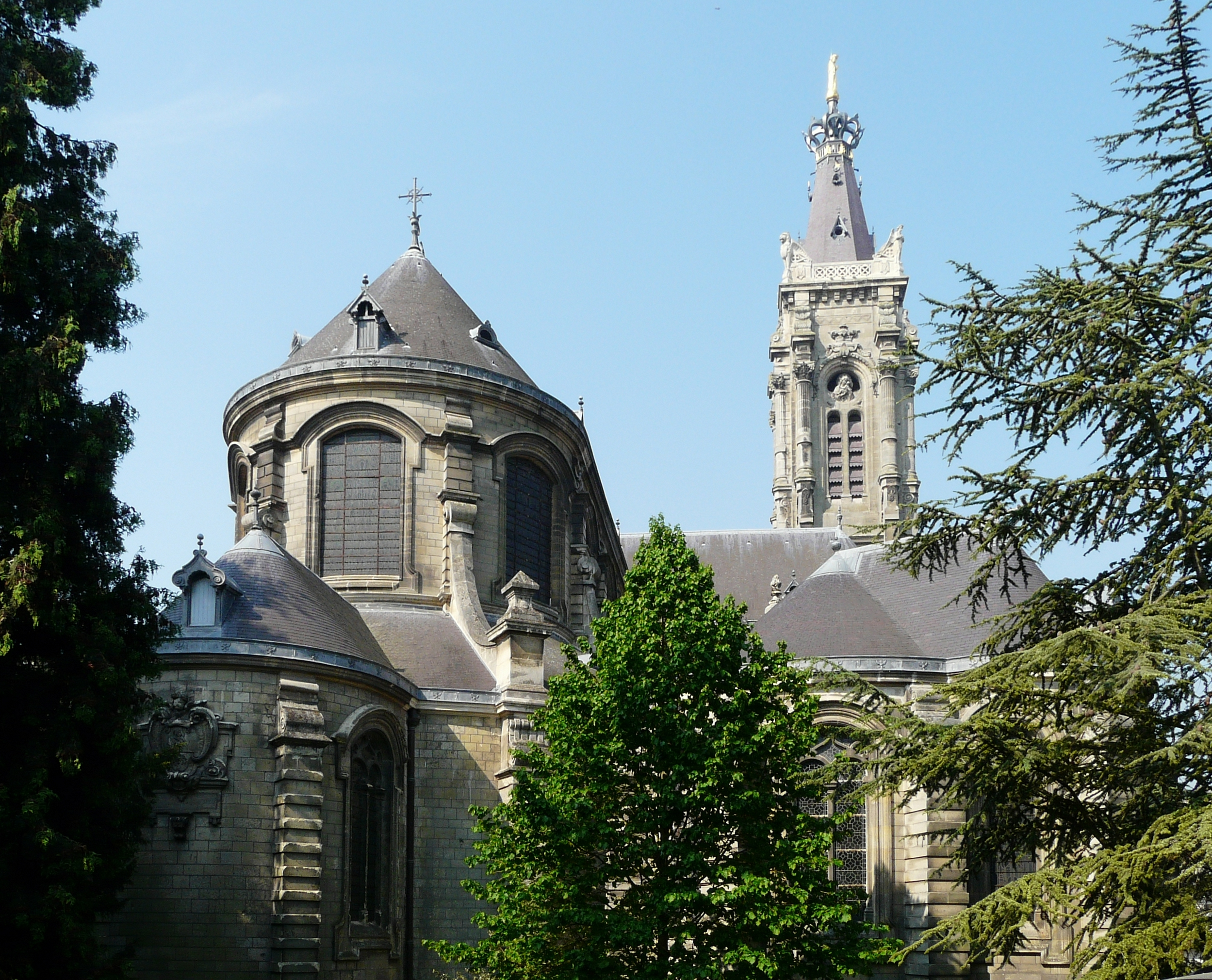 Chevet de la cathédrale Notre-Dame de Grâce de Cambrai